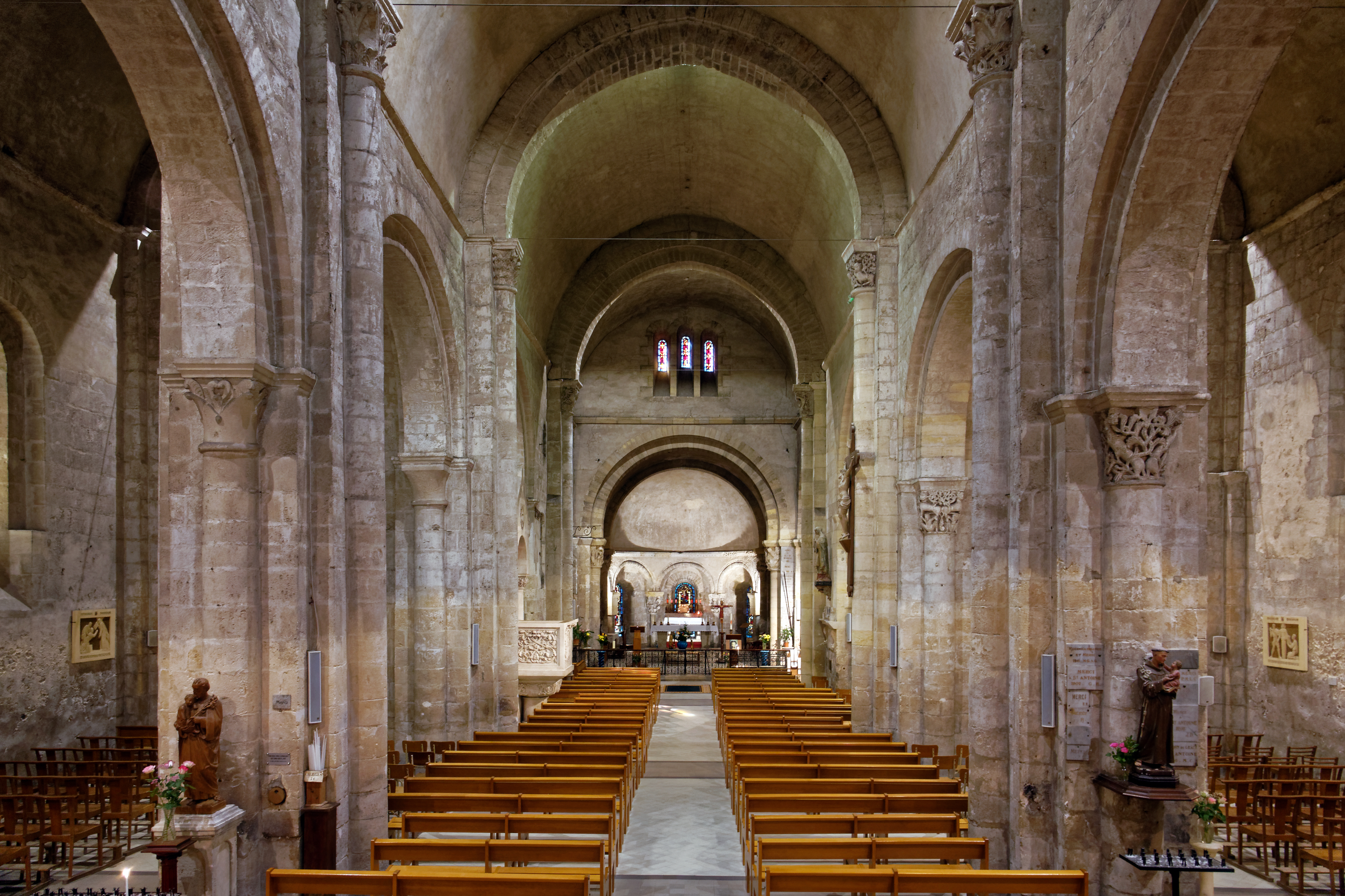 Die romanische Kirche Soulac wurde im 12. Jahrhunder erbaut.